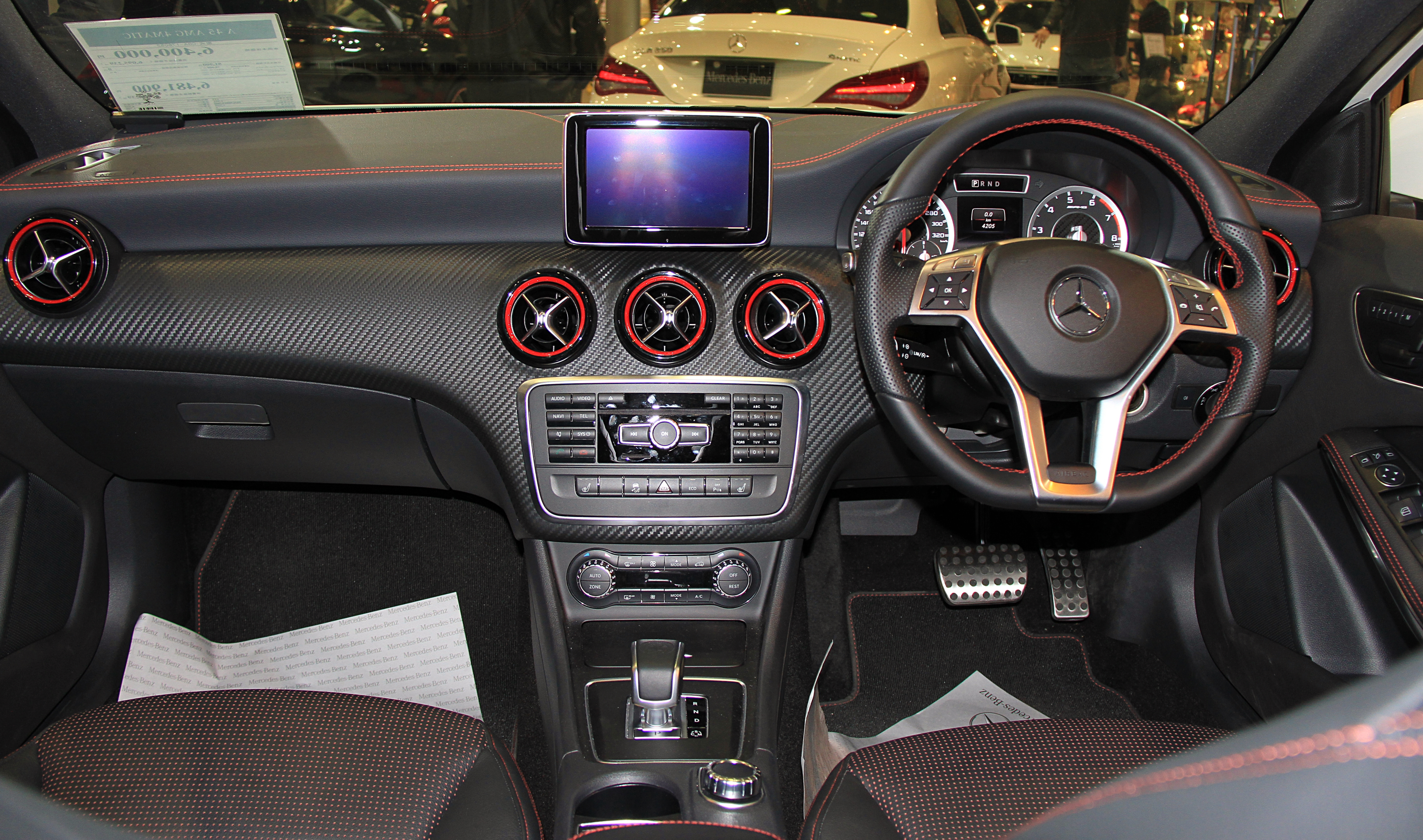 CBA-176052